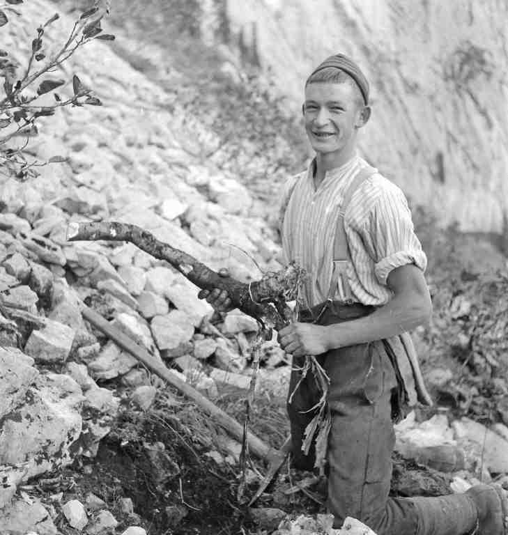 Suche und Gewinnung der Enzian-Wurzeln, aufgenommen in Abländschen (Schweiz)